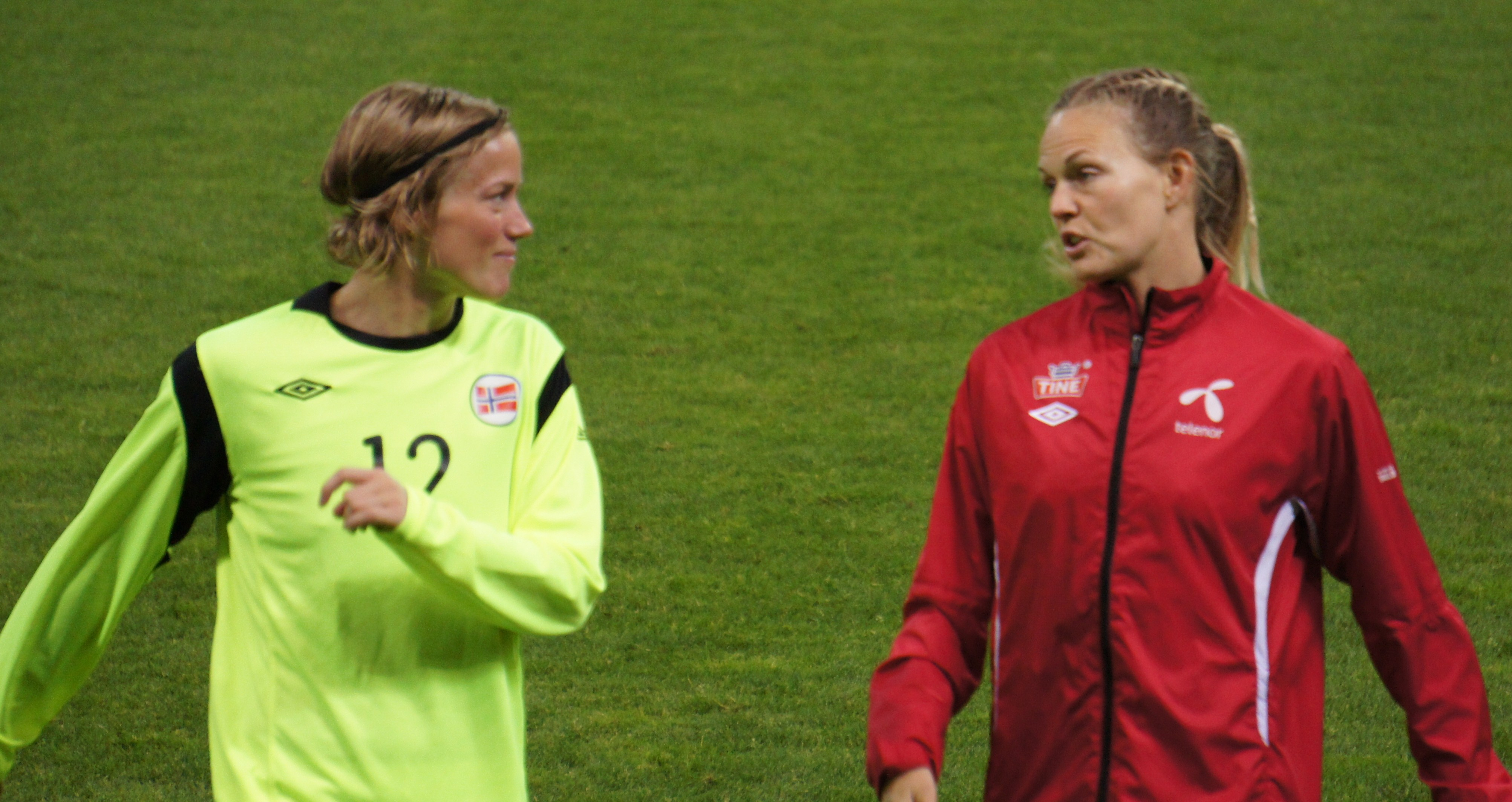 Silje Vesterbekkmo En équipe de Norvège.